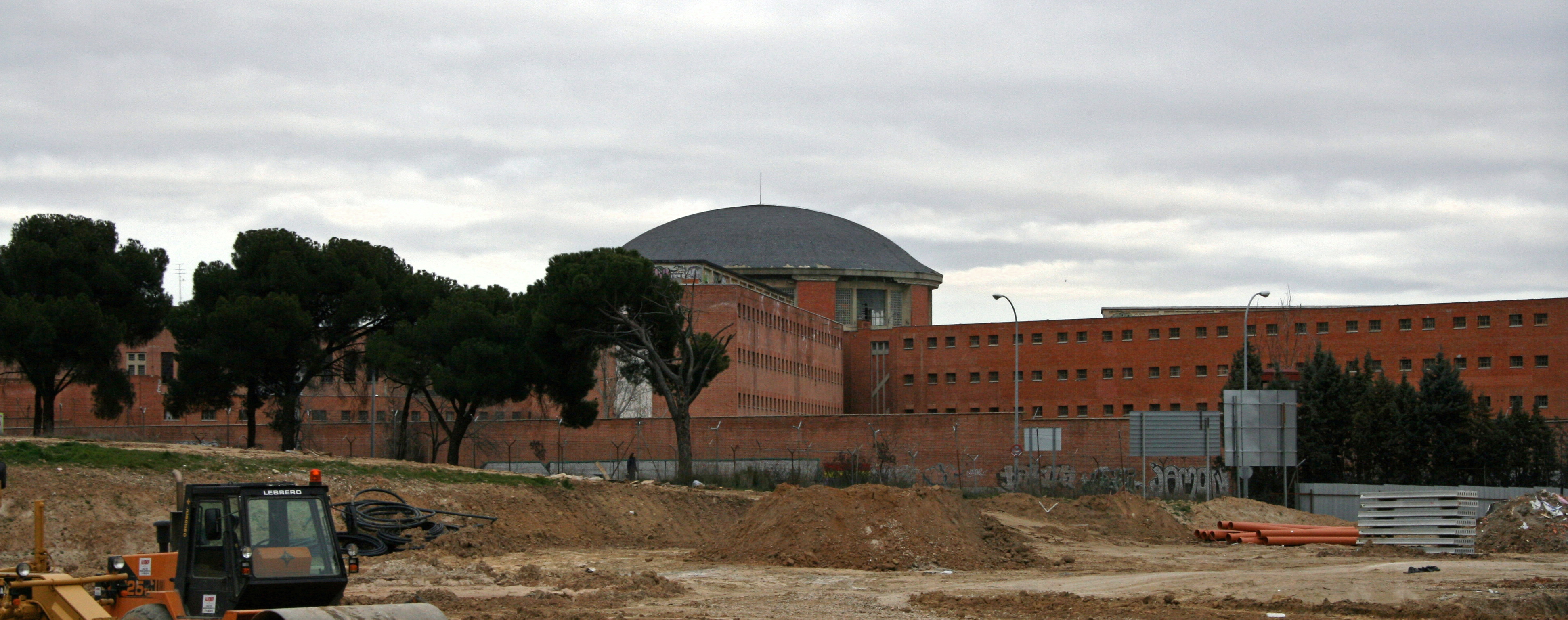 Cárcel de Carabanchel vista desde el Parque de las Cruces (con las obras del nuevo polideportivo en medio), Madrid, España